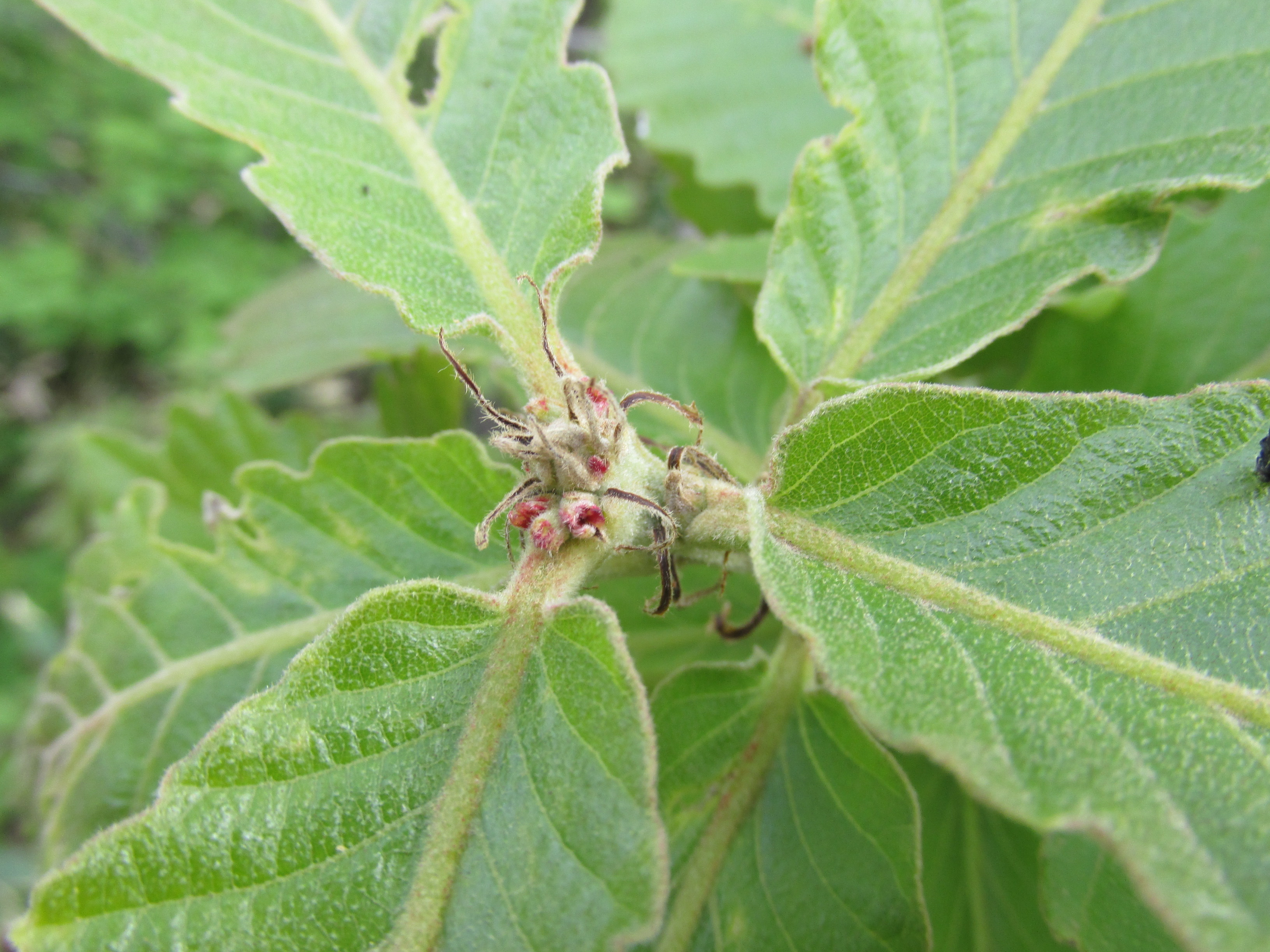 Quercus dentata , Daimyo Oak , カシワ（柏）, 雌花（♀）